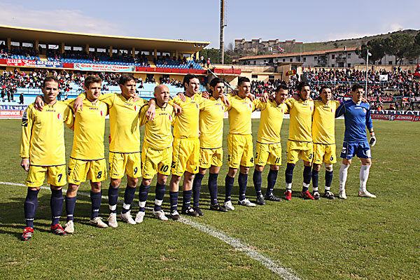 Associazione Sportiva Noicattaro